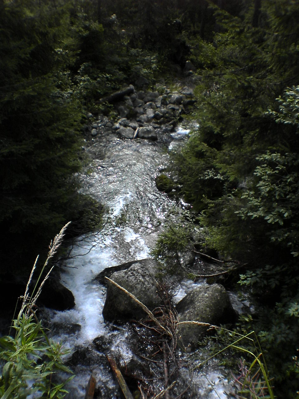 Velický potok (down the Velický most)